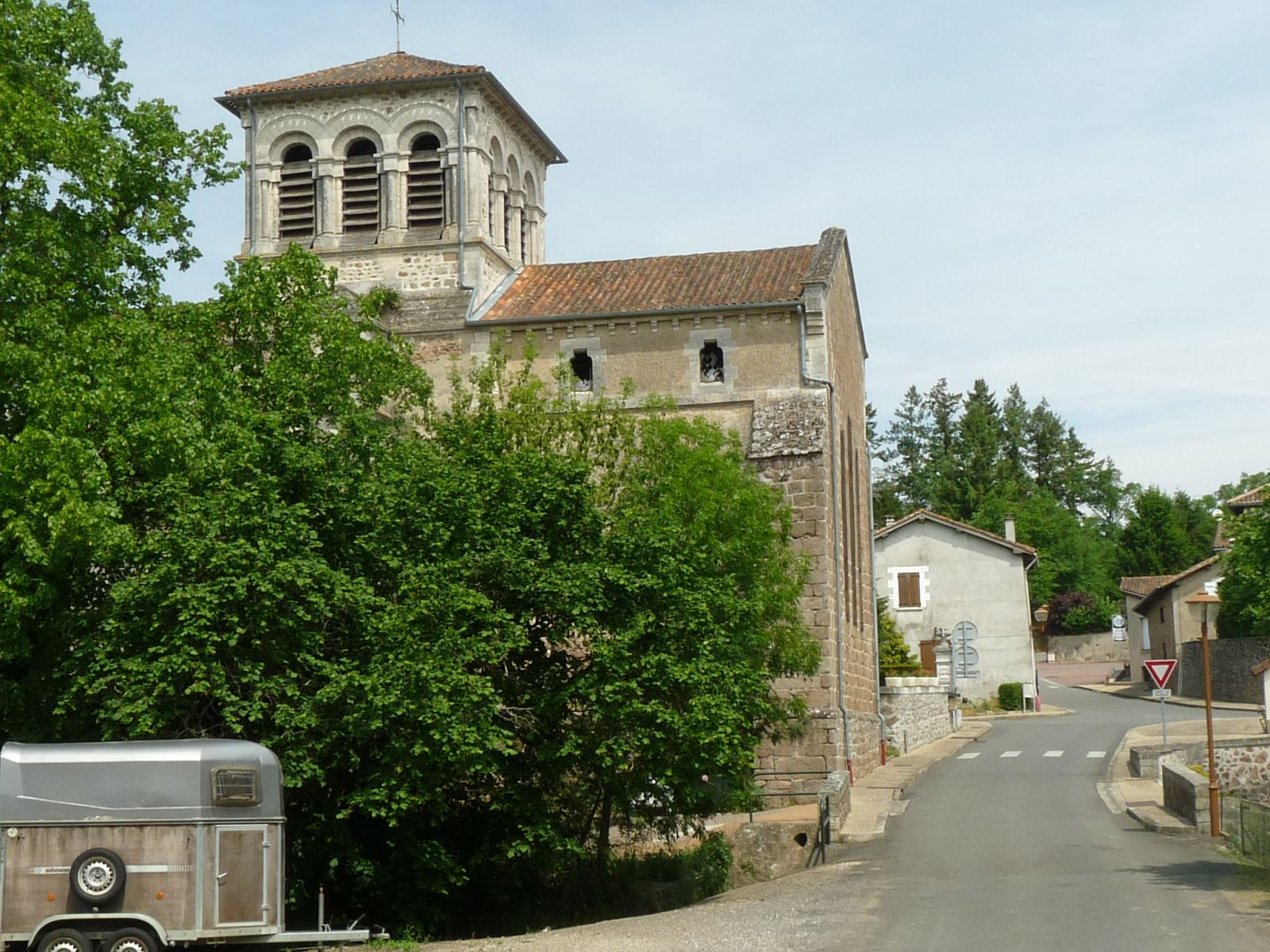 église de Chirac vue du sud, Charente, France